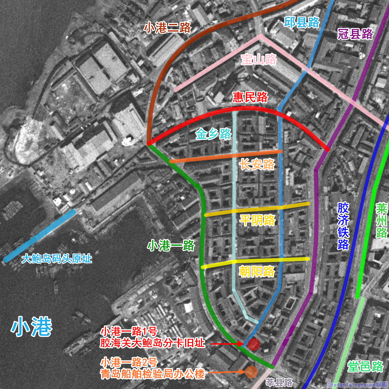 青岛海关后及周边卫星影像图解，美国KH-7卫星所摄